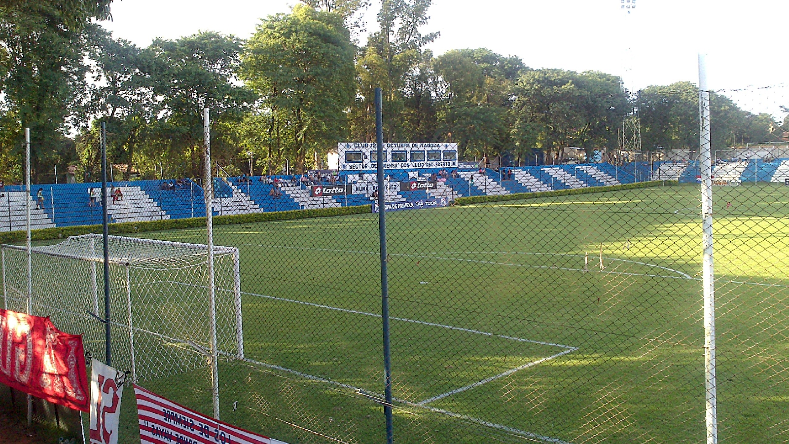 Graderias oeste del estadio Juan C. Pettengill (llamado actualmente Luis Salinas, del club 12 de Octubre de Itauguá. Paaraguay.